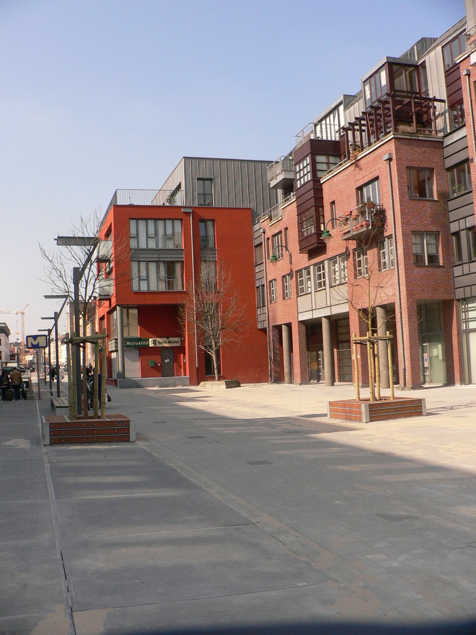 Foto van Mario Scolas.